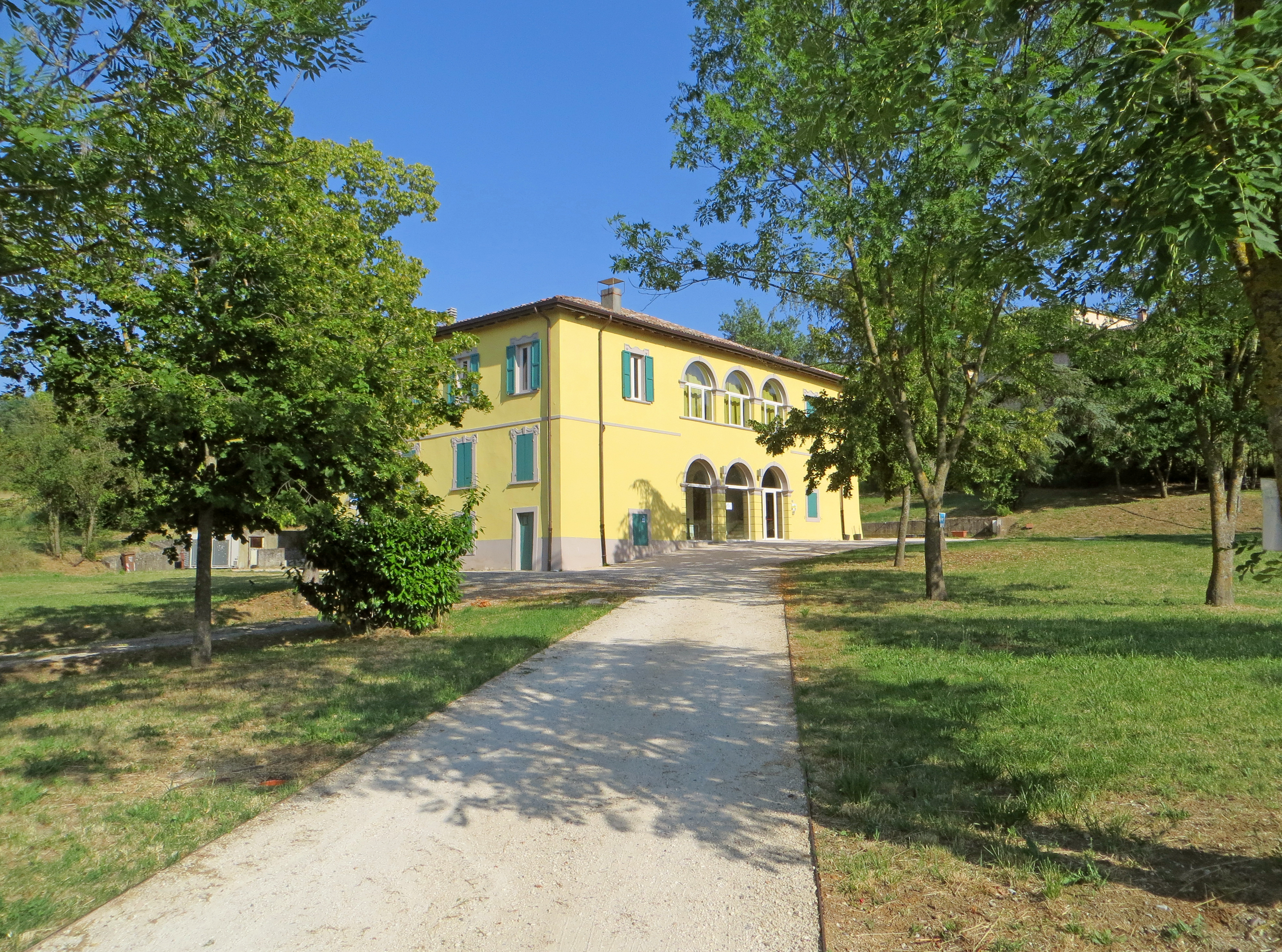 Terme (Lesignano de' Bagni) - facciata e lato nord